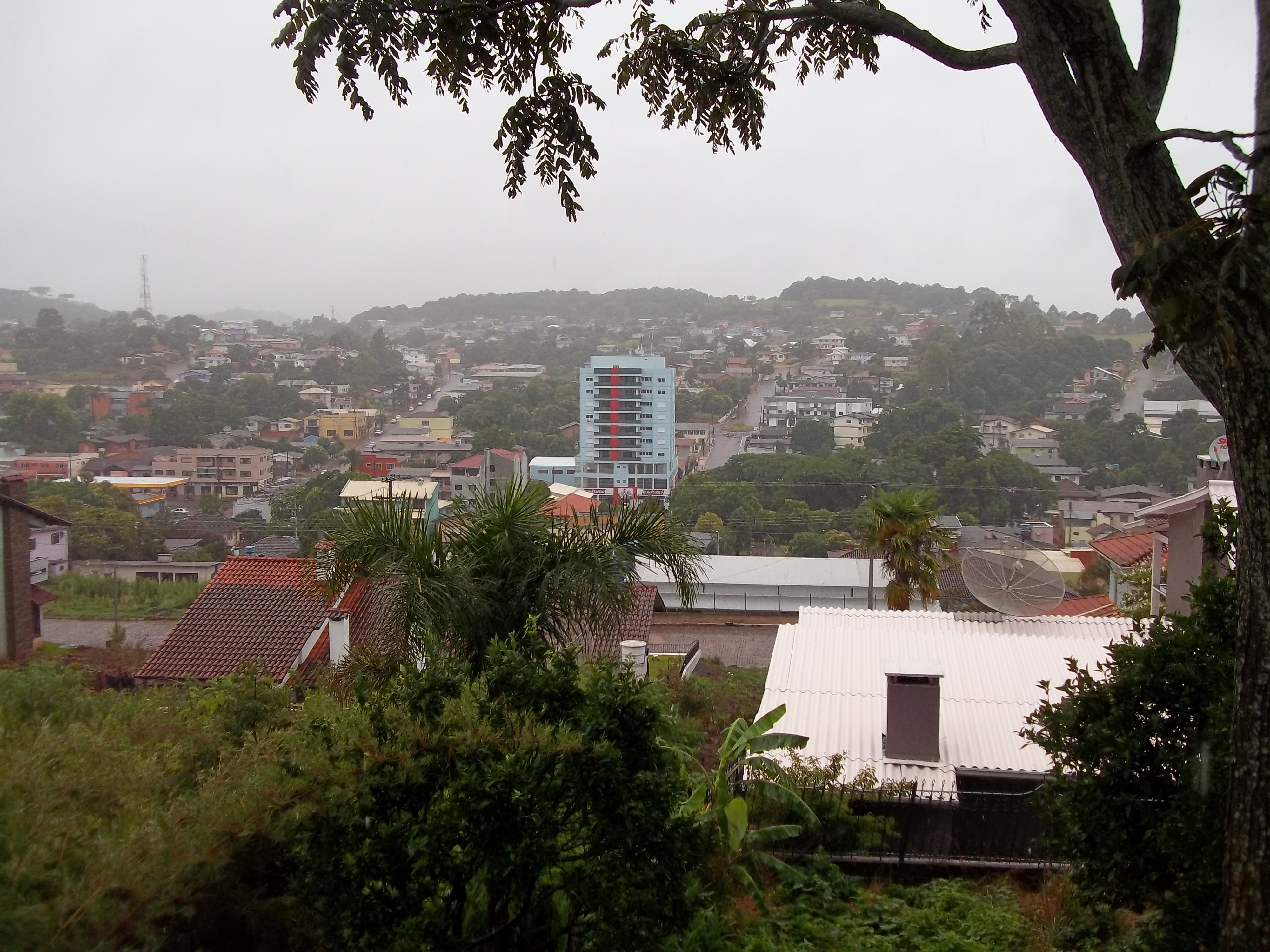 São José do Ouro visto do bairro Altos da Boa Esperança em dia chuvoso.